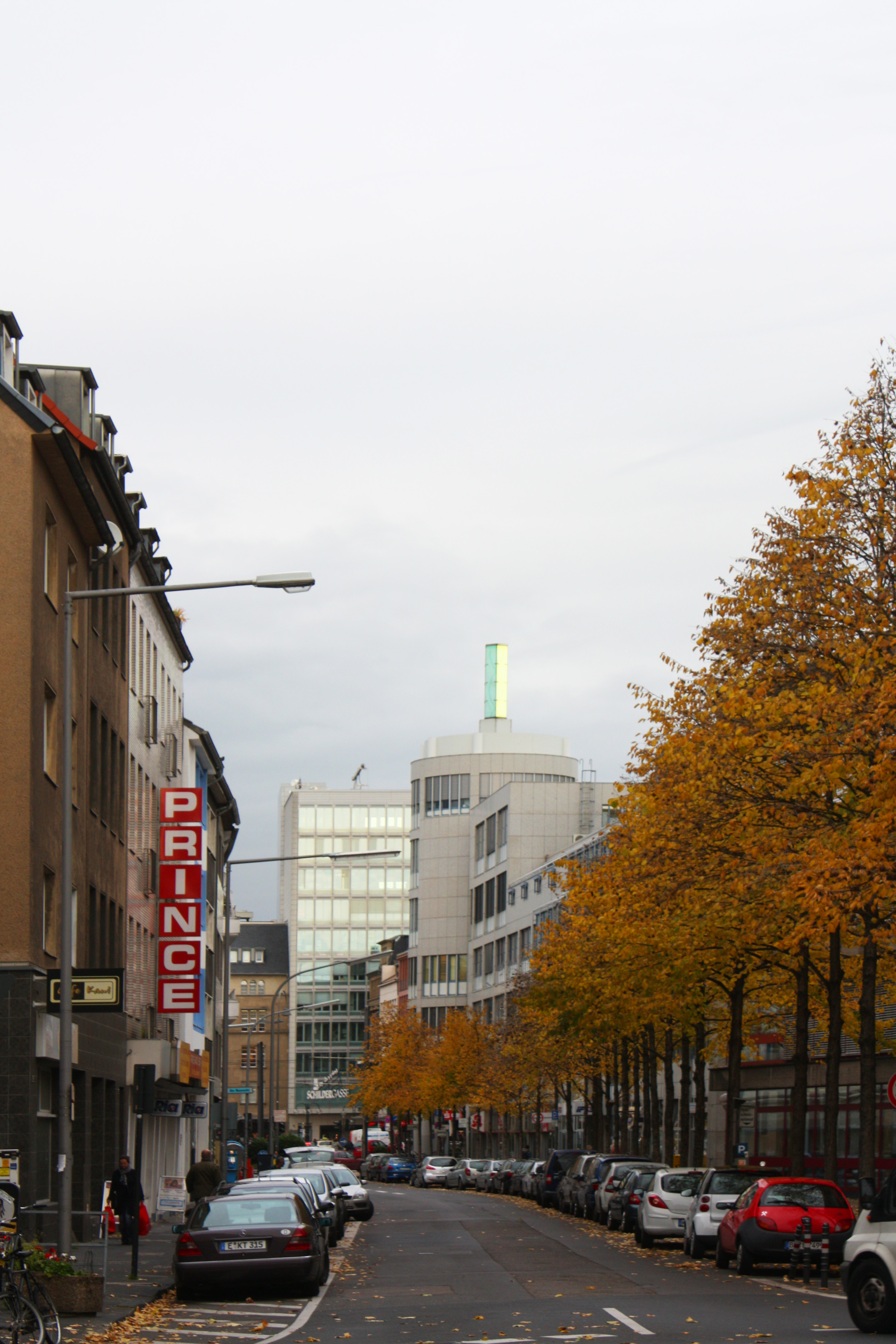 Das Teilstück der Fleischmengergasse zwischen dem Kölner Neumarkt und der Lungengasse, ist der Ursprung der zuerst im 13. Jahrhundert erwähnten Straße